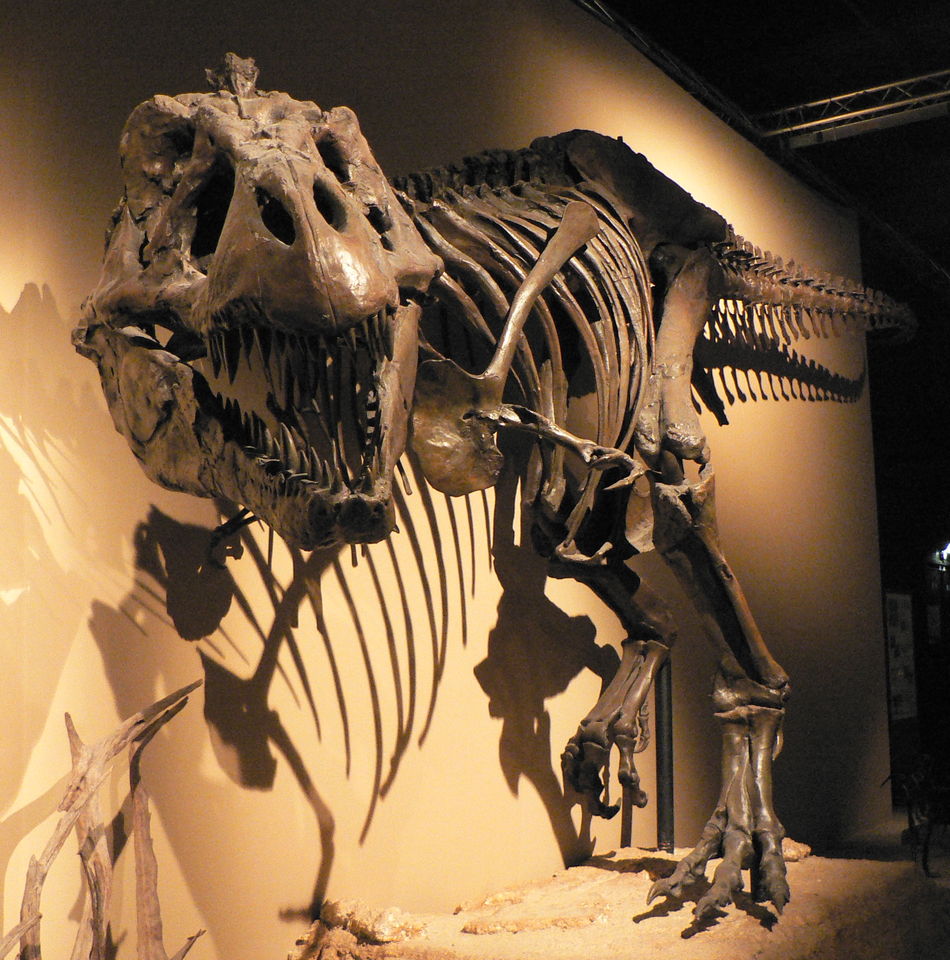 Tyrannosaurus rex, Palais de la Découverte, Paris